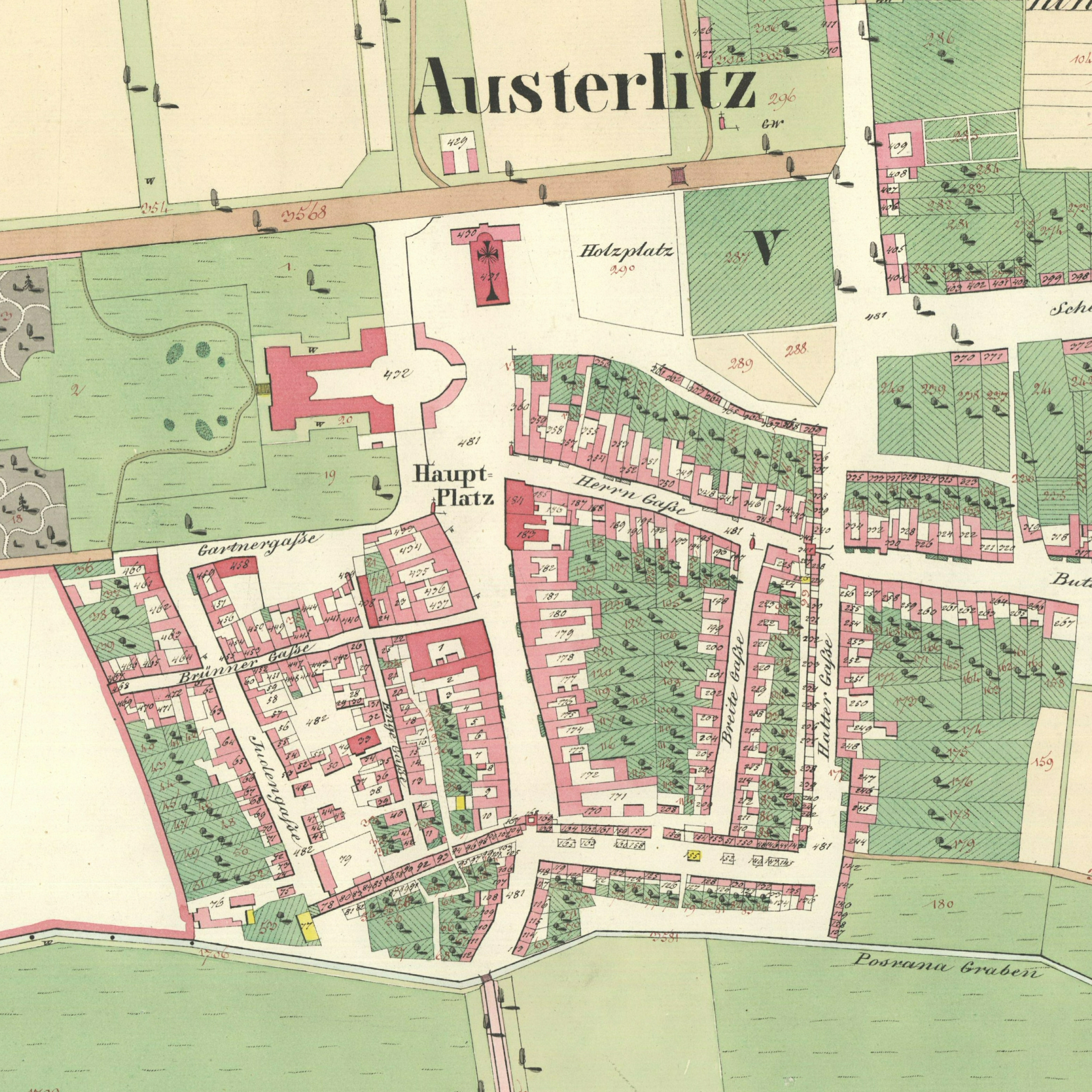 Slavkov na císařském otisku mapy Stabilního katastru z roku 1826, detail centra města.